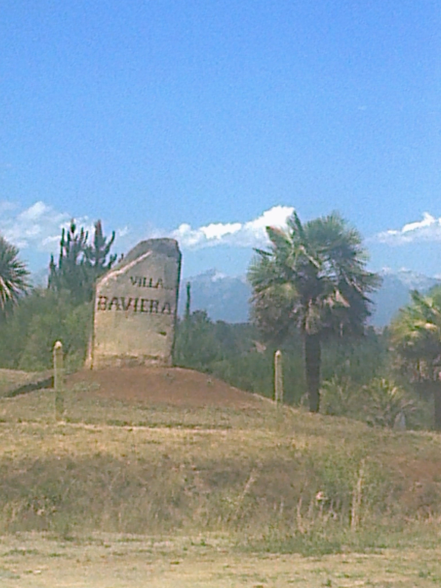 Hito que marca la entrada al sector de Villa Baviera (y que antiguamente era la entrada al fundo de la desaparecida Colonia Dignidad)